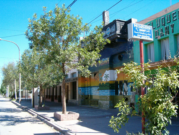 Av. 25 de Mayo, Añatuya.